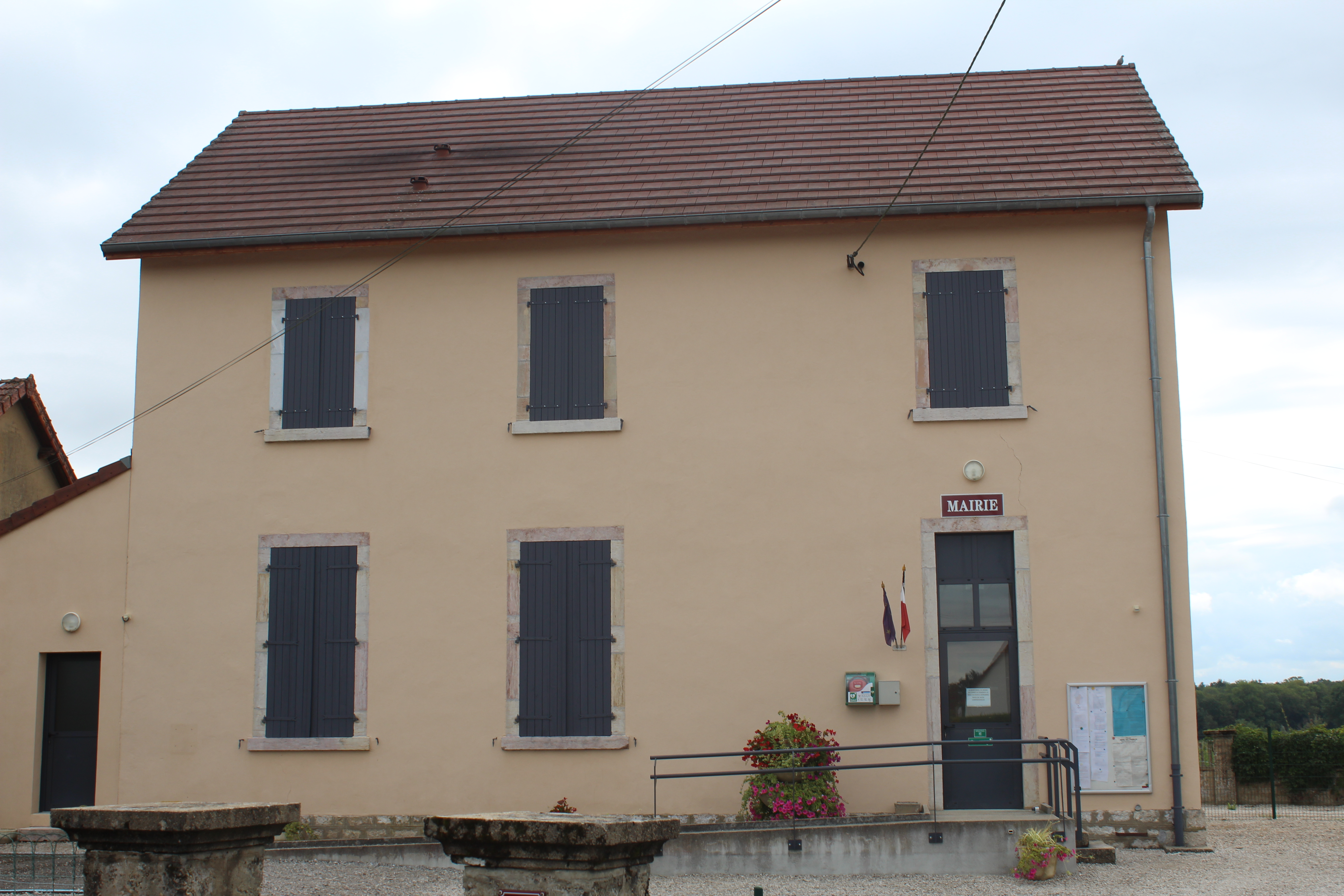 Mairie de Foulenay.